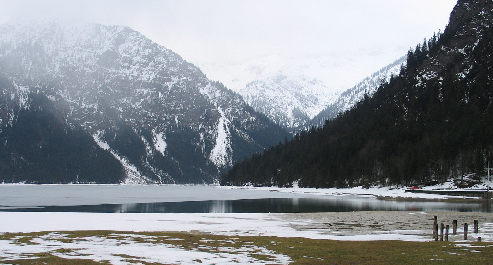 Plansee in Beieren